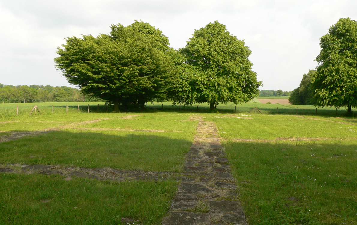 Ausgegrabene Fundamente des Stift Asbeke